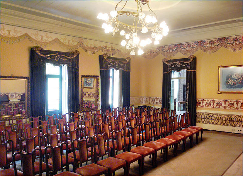 Interior do Salão José Lewgoy, Solar dos Câmara, Porto Alegre, Brasil.